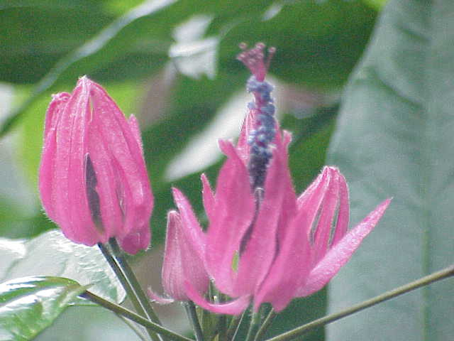 Species: Pavonia multiflora Family: Malvaceae Image No. 1